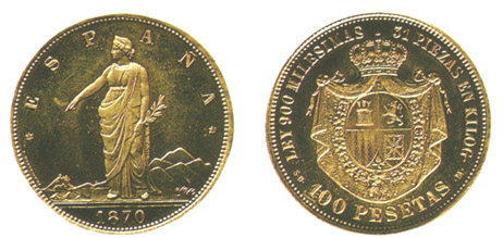 100 pesetas